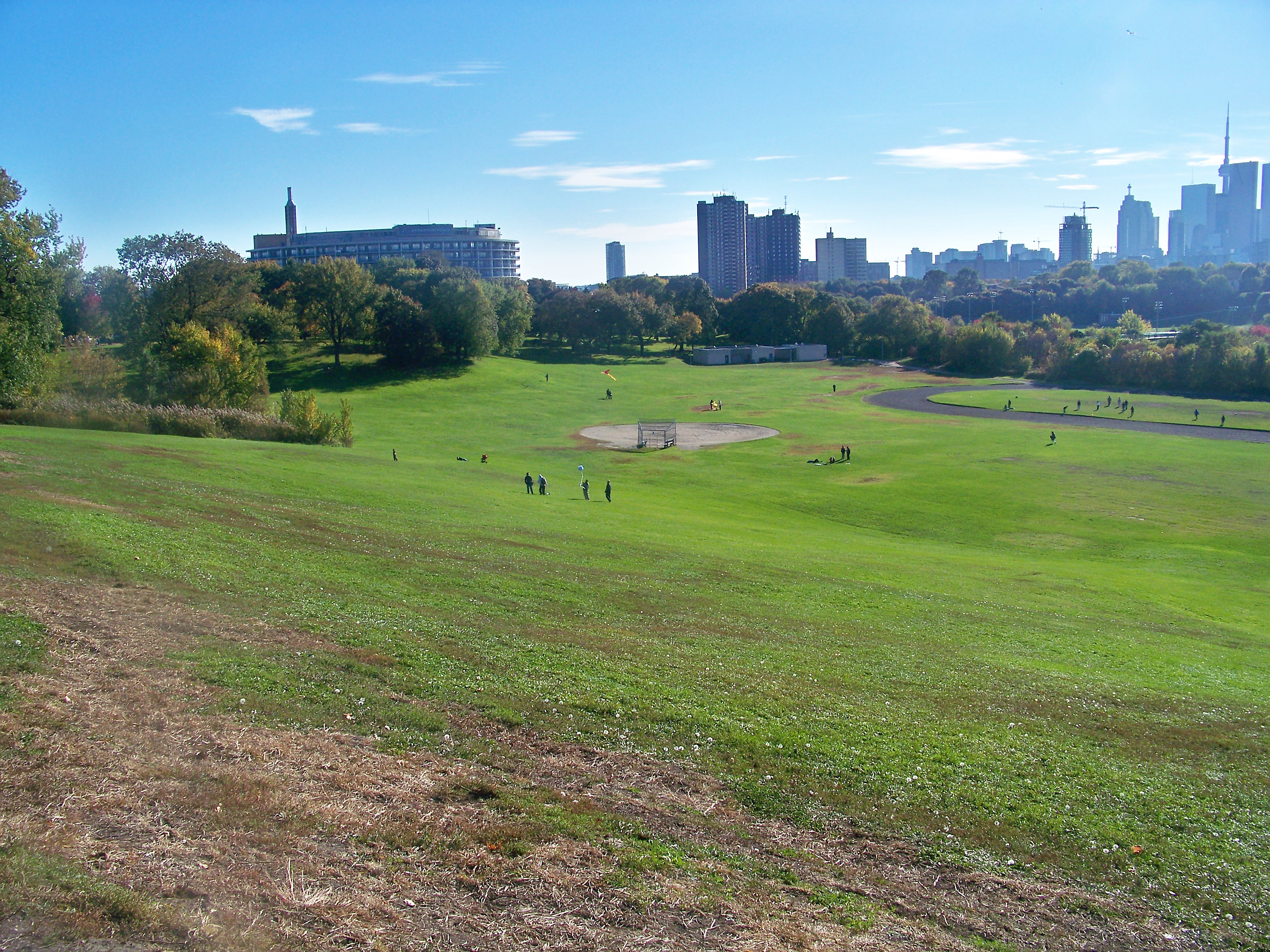 Park Riverdale à Toronto, Ontario, Canada.